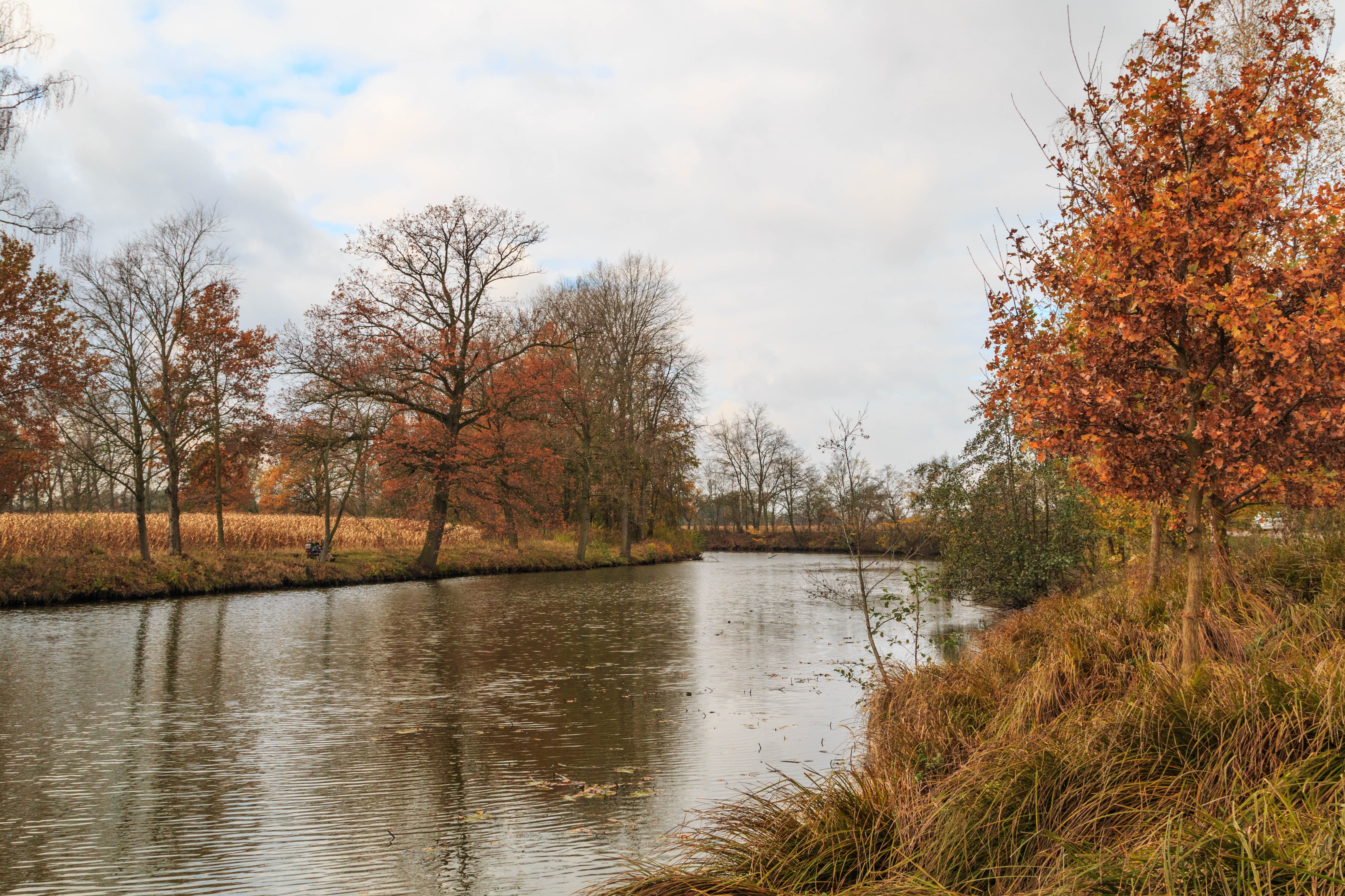 Staré Labe u Lohenic Project: Vodstvo.